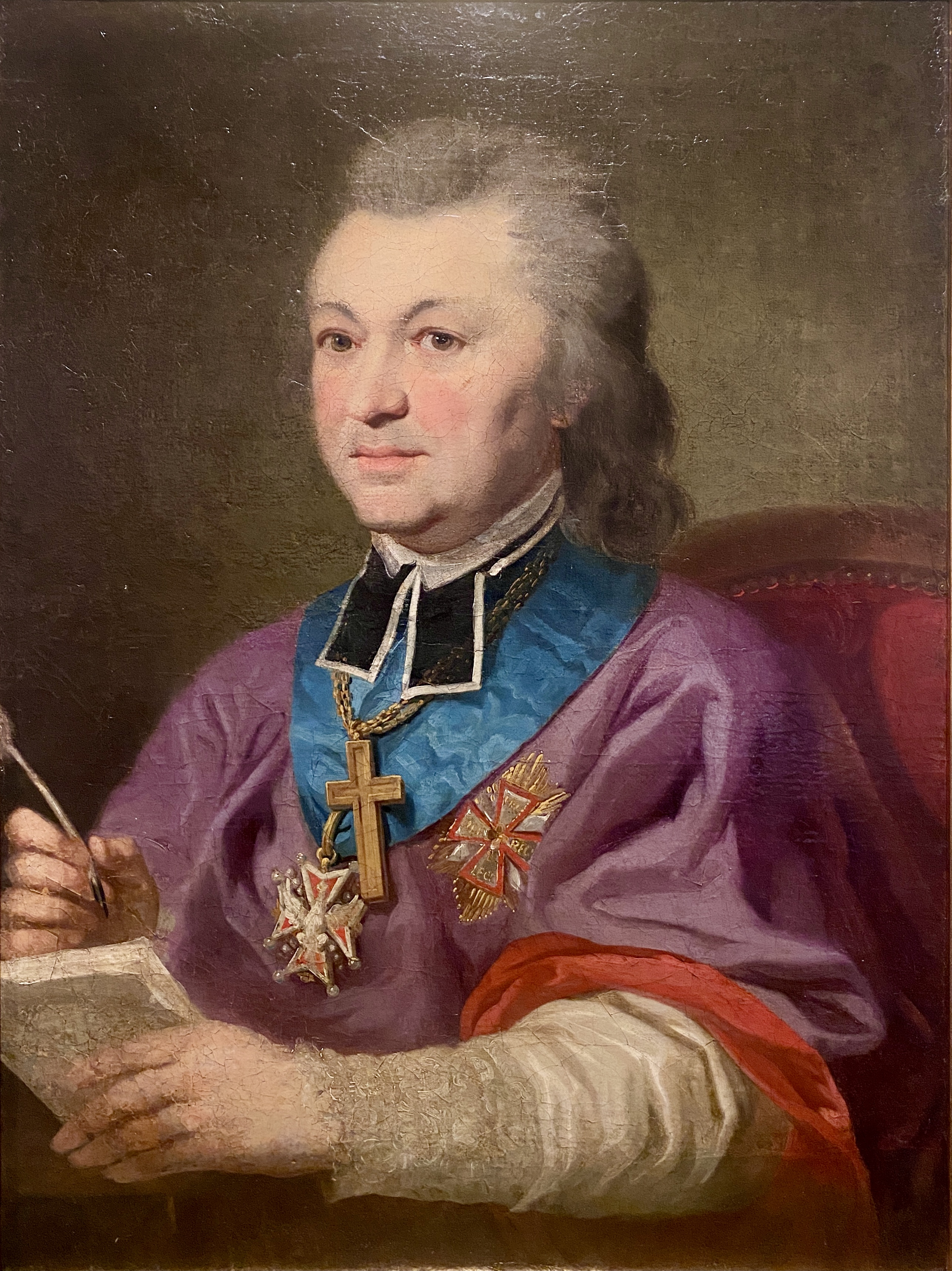 Józef Kossakowski (biskup)